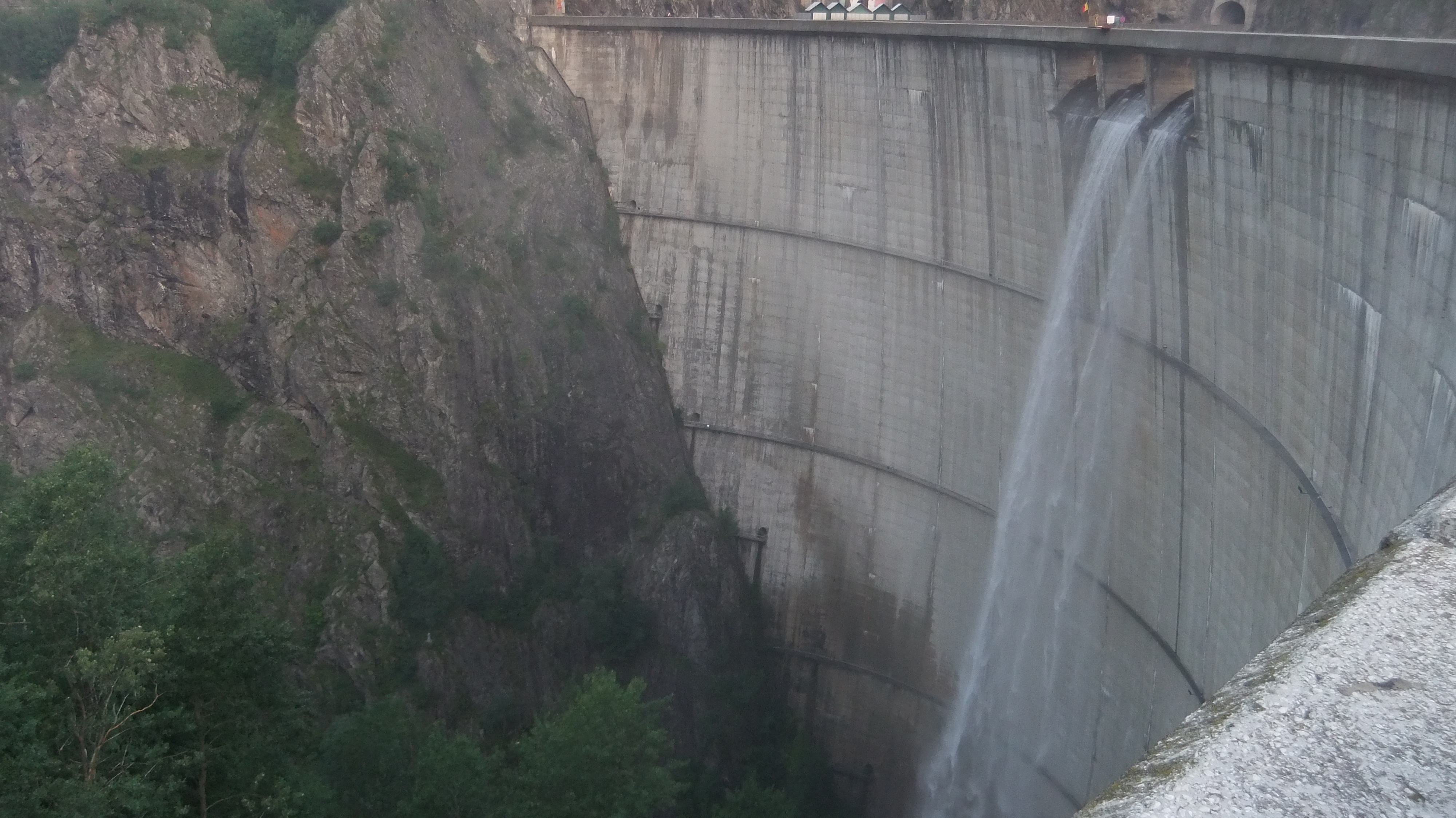 Arefu, Romania